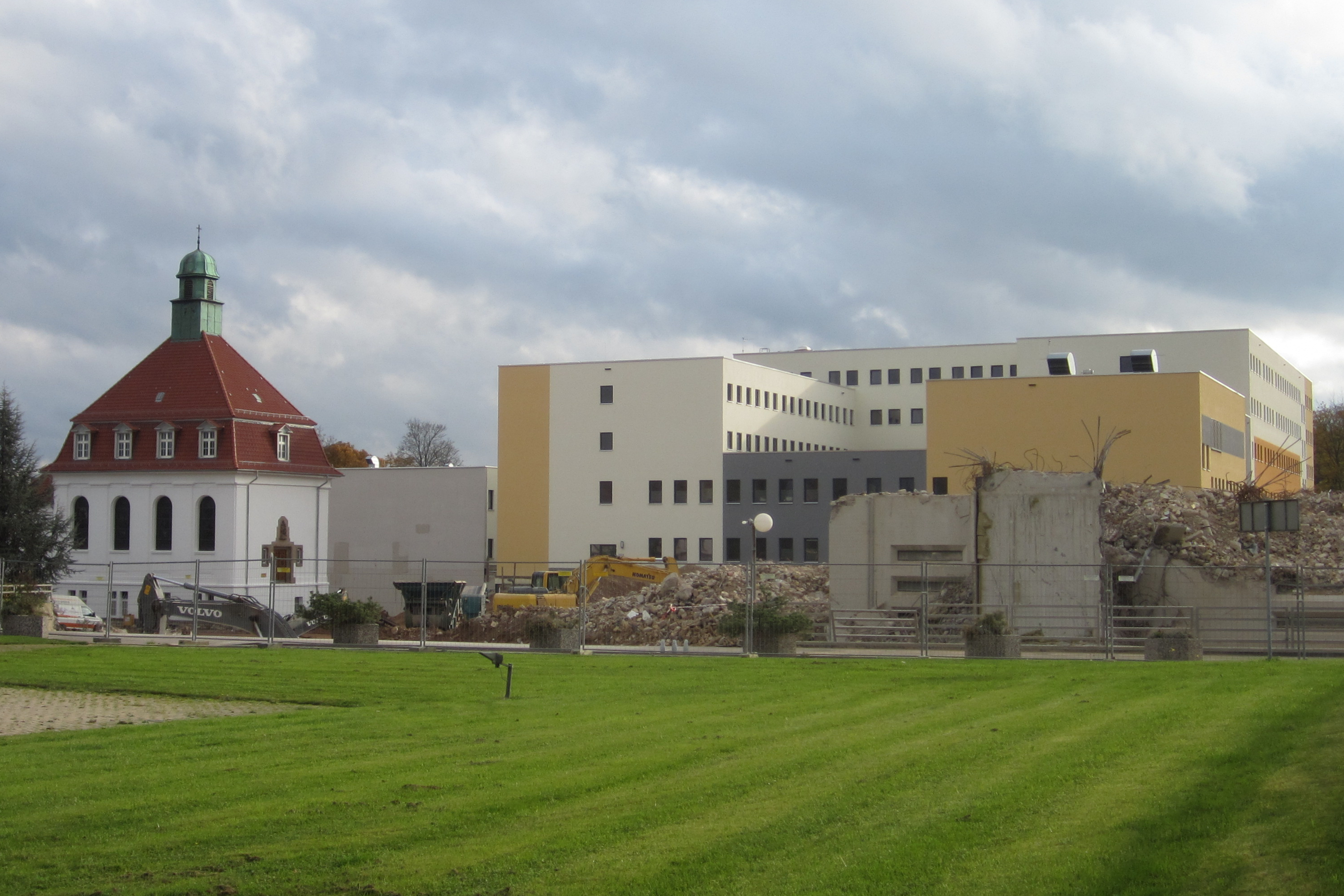 Das Helios Klinikum Warburg im November 2014. Im Vordergrund Überreste des abgerissenen ehemaligen Erweiterungsbaus des St.-Petri-Hospitals von 1973. Links die Kapelle des Altbaus.